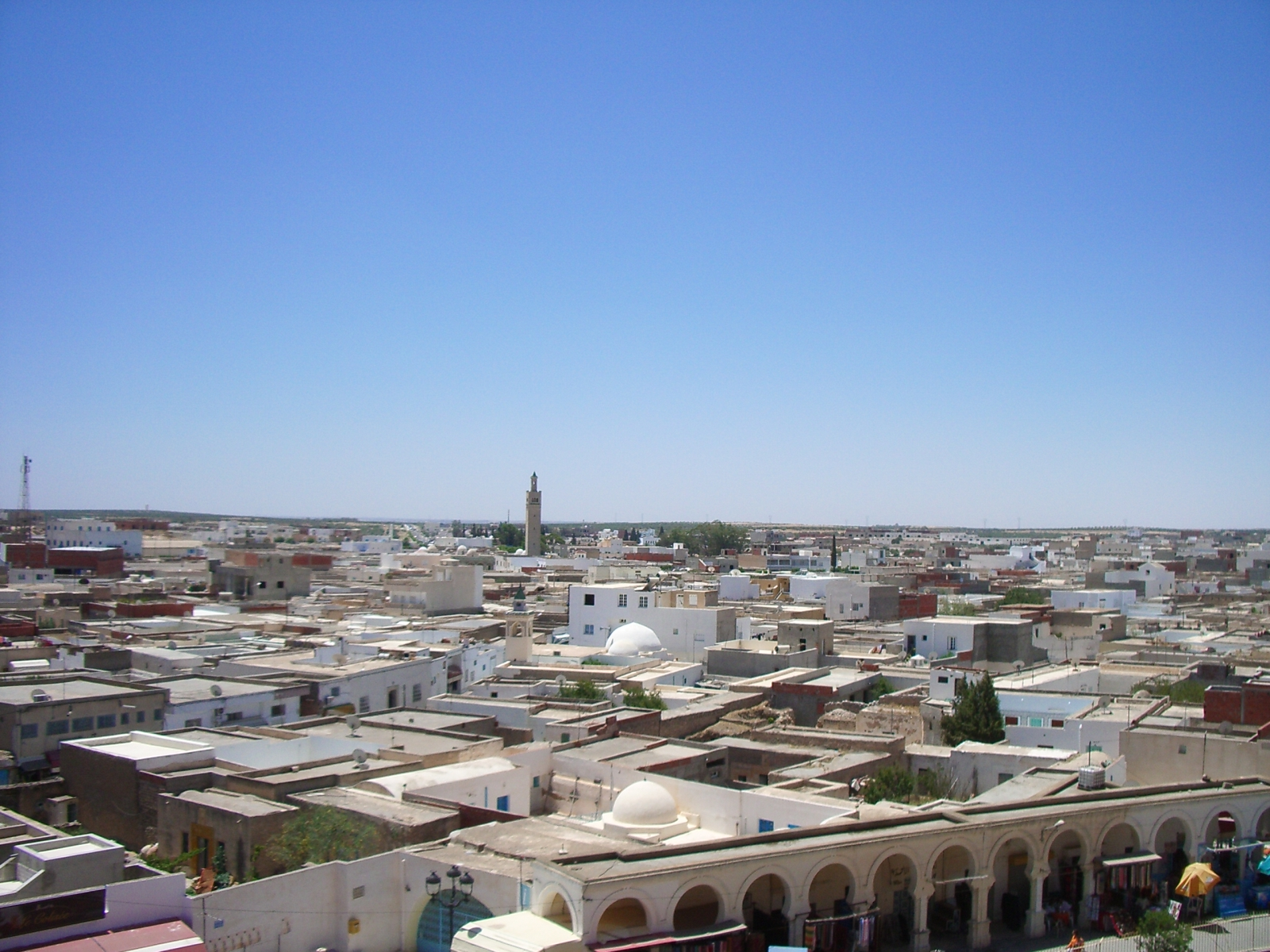 Ciutat de El Djem des de l'amfiteatre